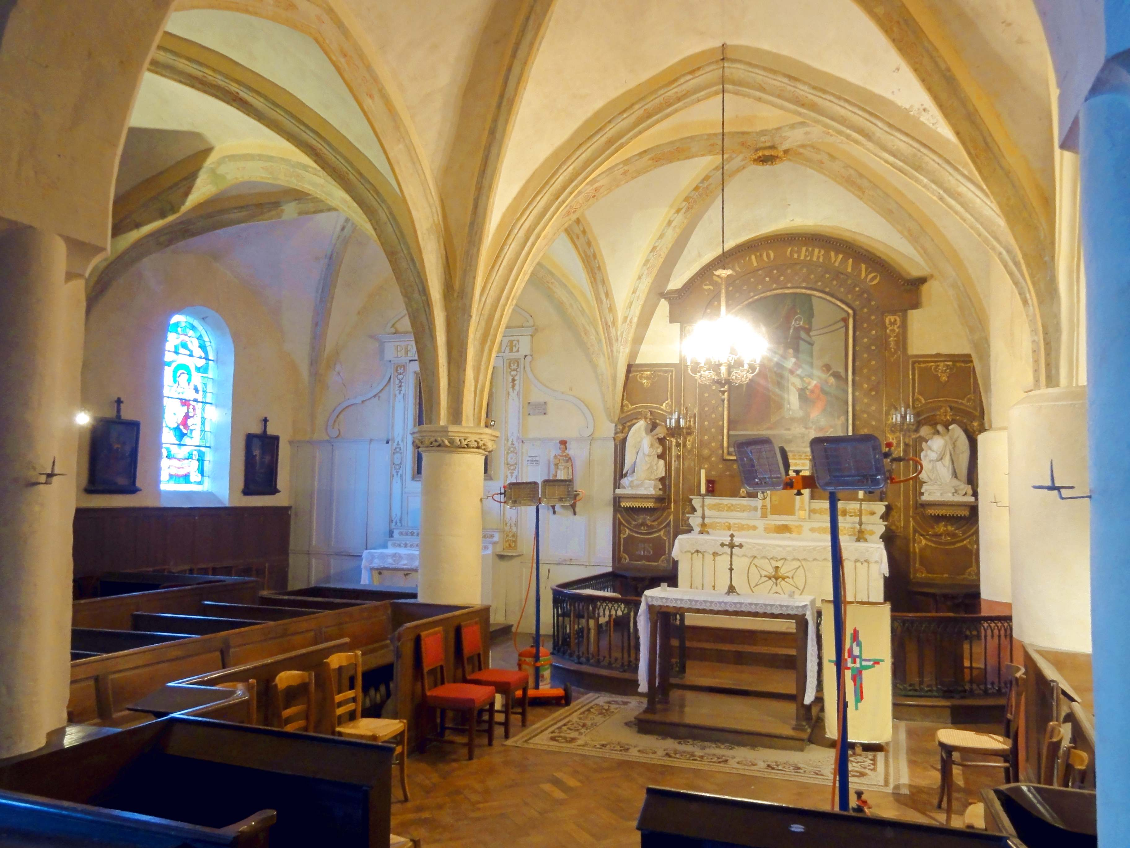 Intérieur de l'église - voir titre.